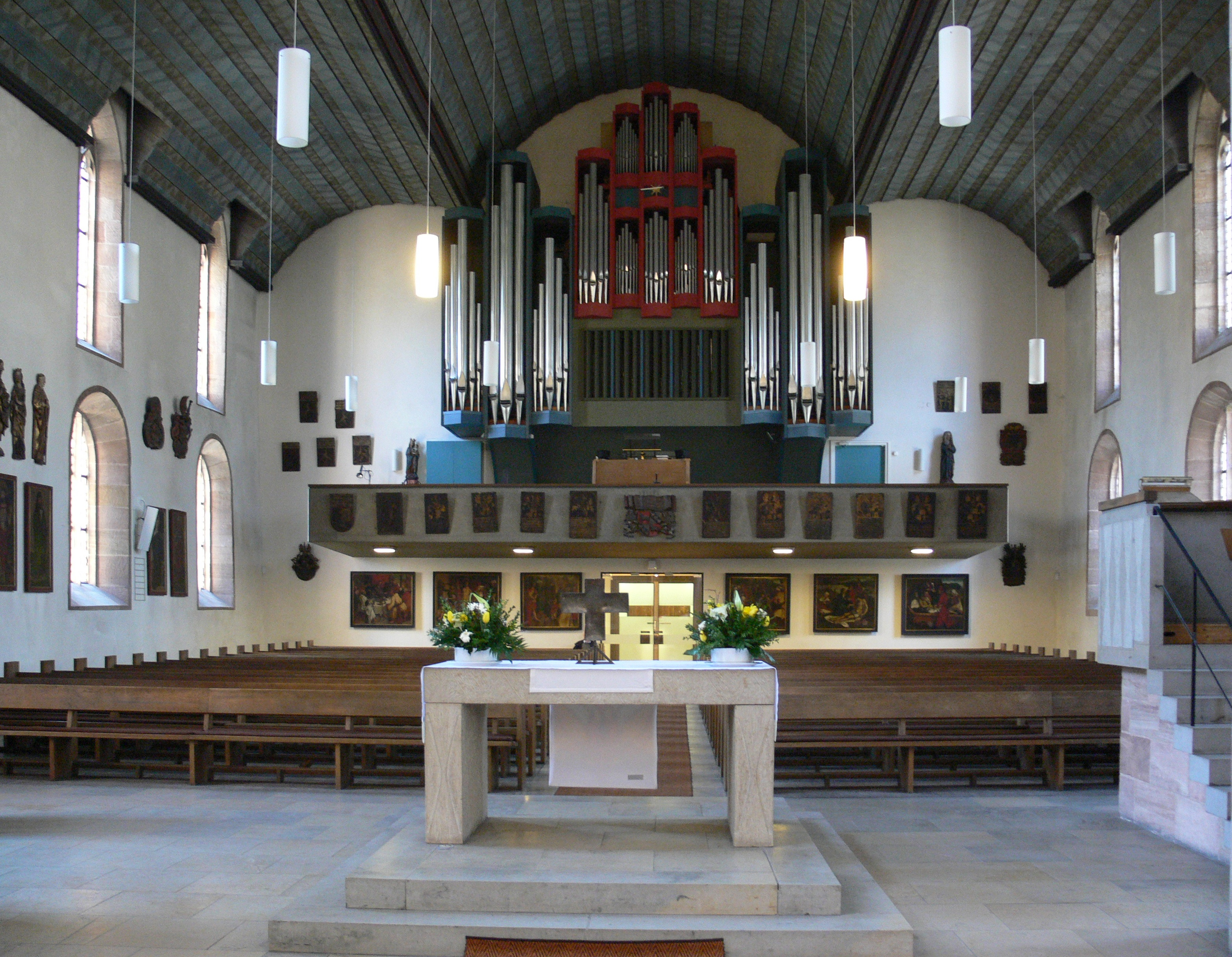 Nürnberg, Kirche St. Jakob Blick zur Orgel